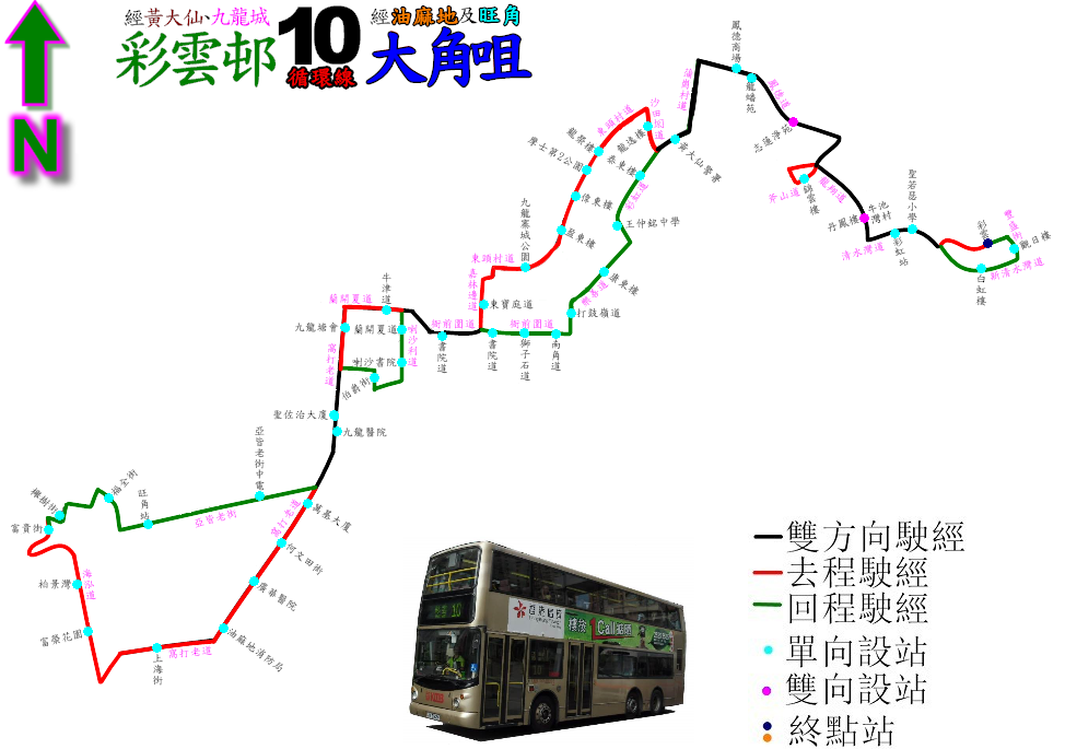 中文（香港）: 九巴10線的走線圖